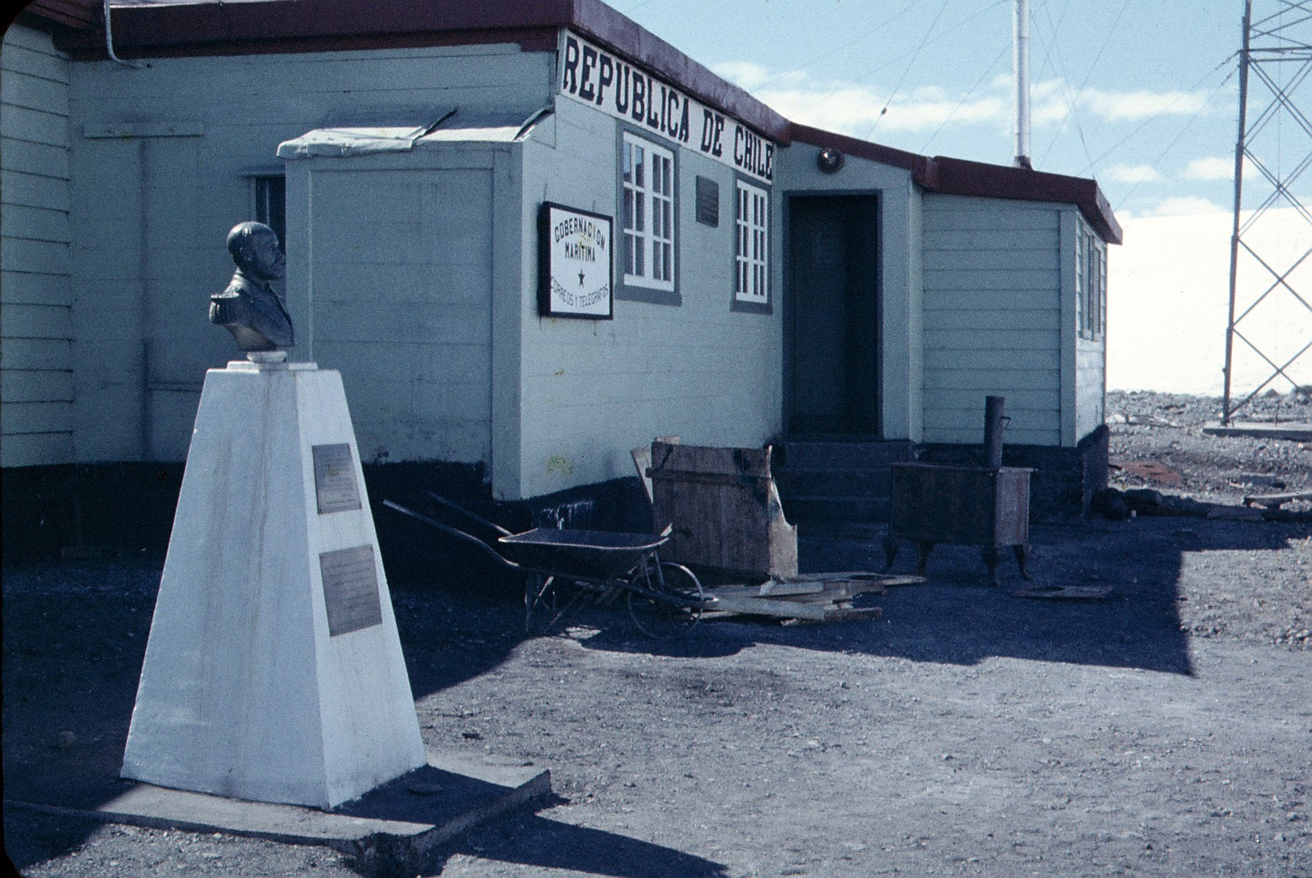 Base Arturo Prat de la Armada en puerto Soberanía, isla Greenwich. Chile